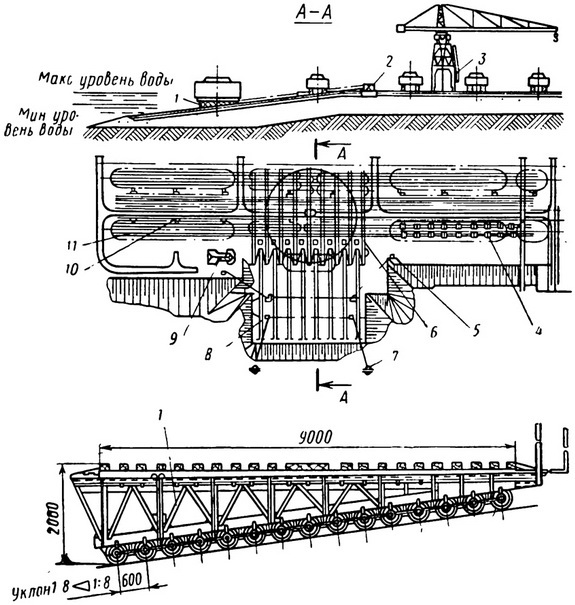 Рисунок поперечного гребенчатого слипа